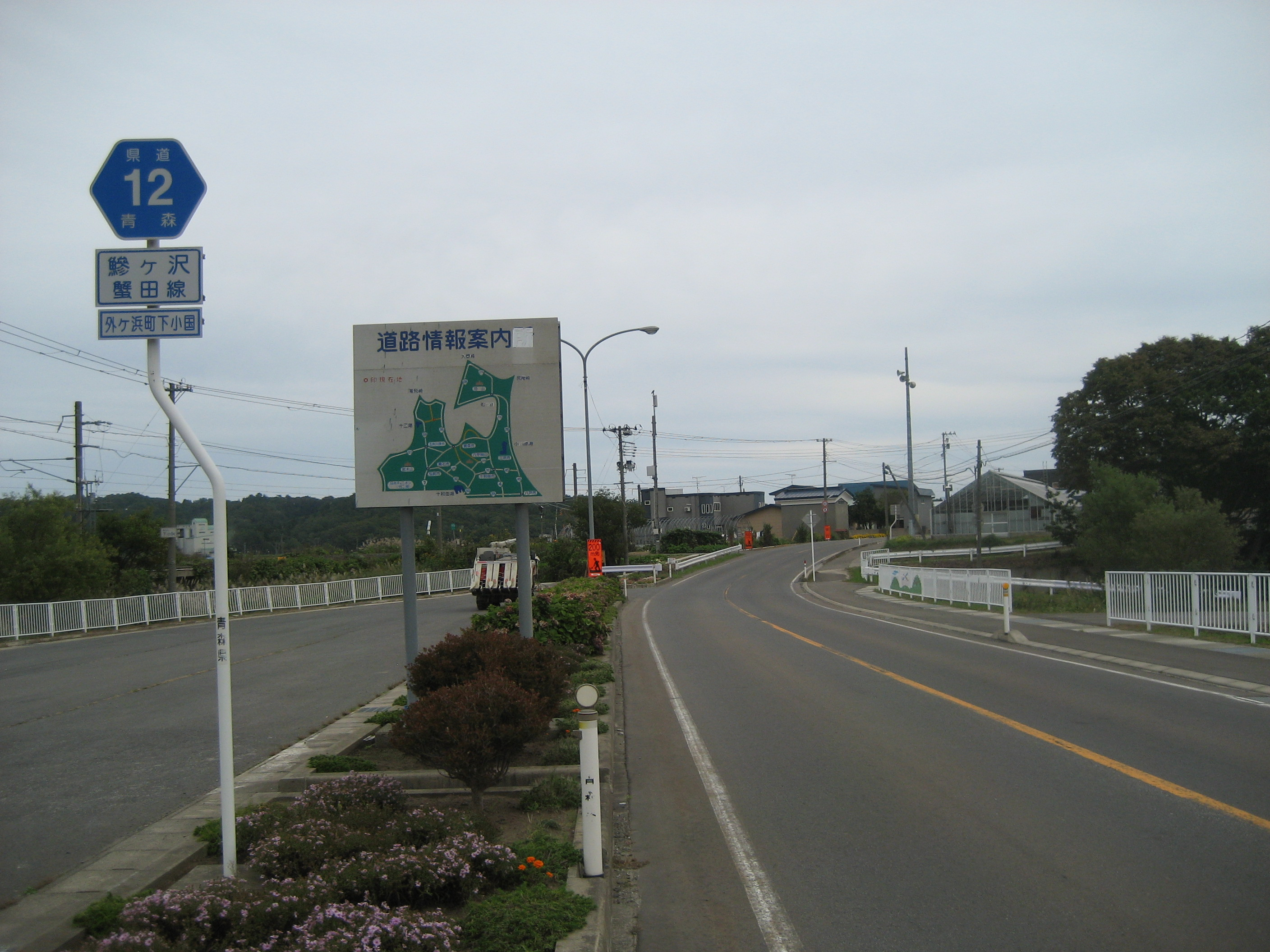 青森県道12号線外ヶ浜町下小国付近